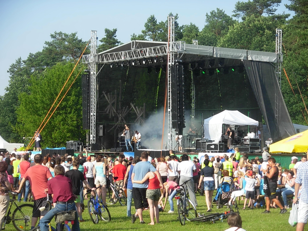 Koncert zespołu Feel na imprezie Powitanie Lata w Bydgoszczy-Myślęcinku